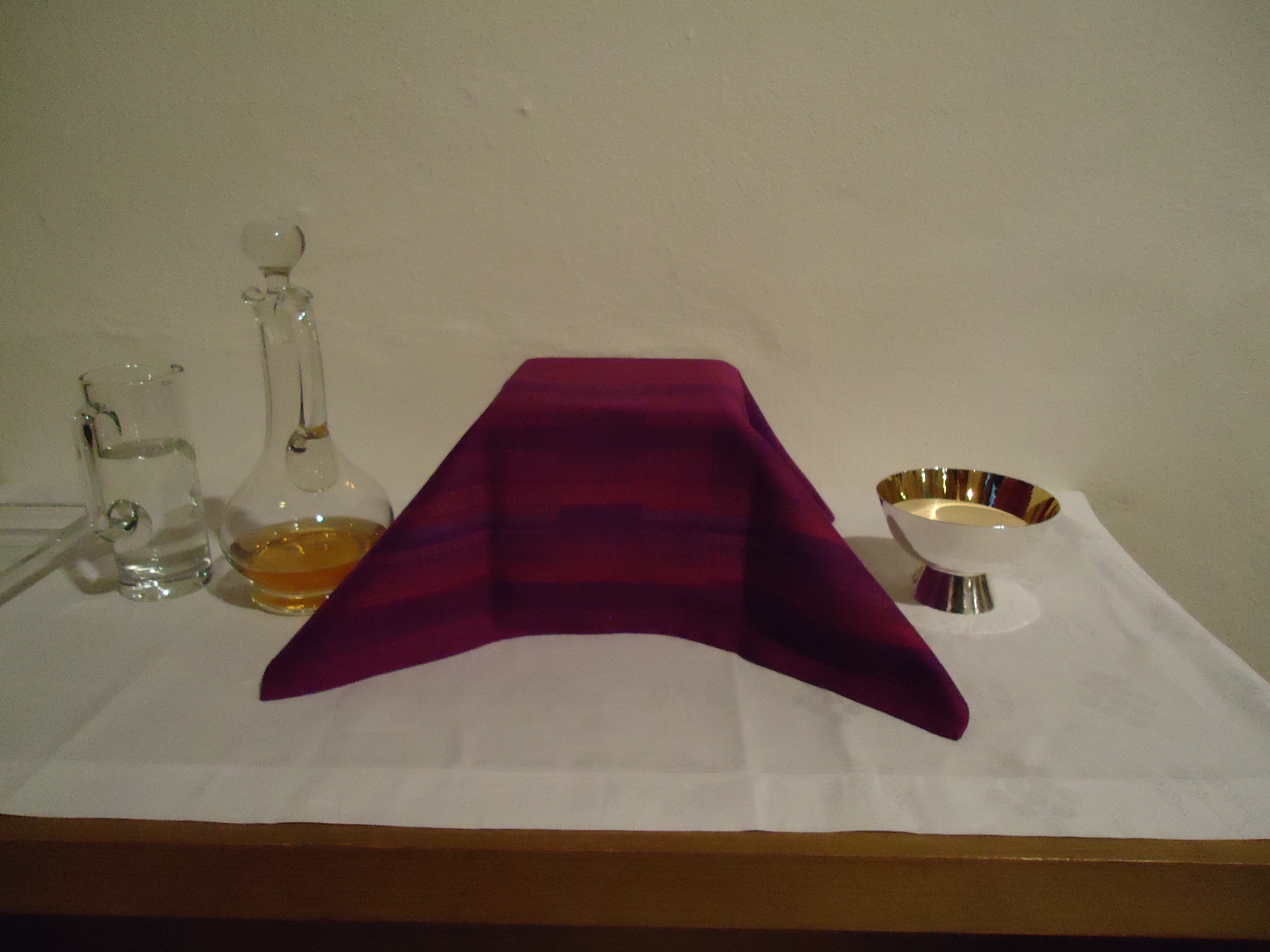 Beckum, St. Stephanus